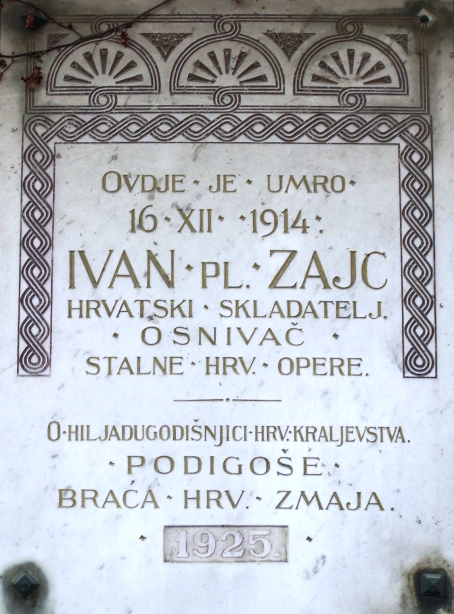 Spomen-ploča u Visokoj ulici 16 u Zagrebu na kući u kojoj je umro Ivan Zajc.